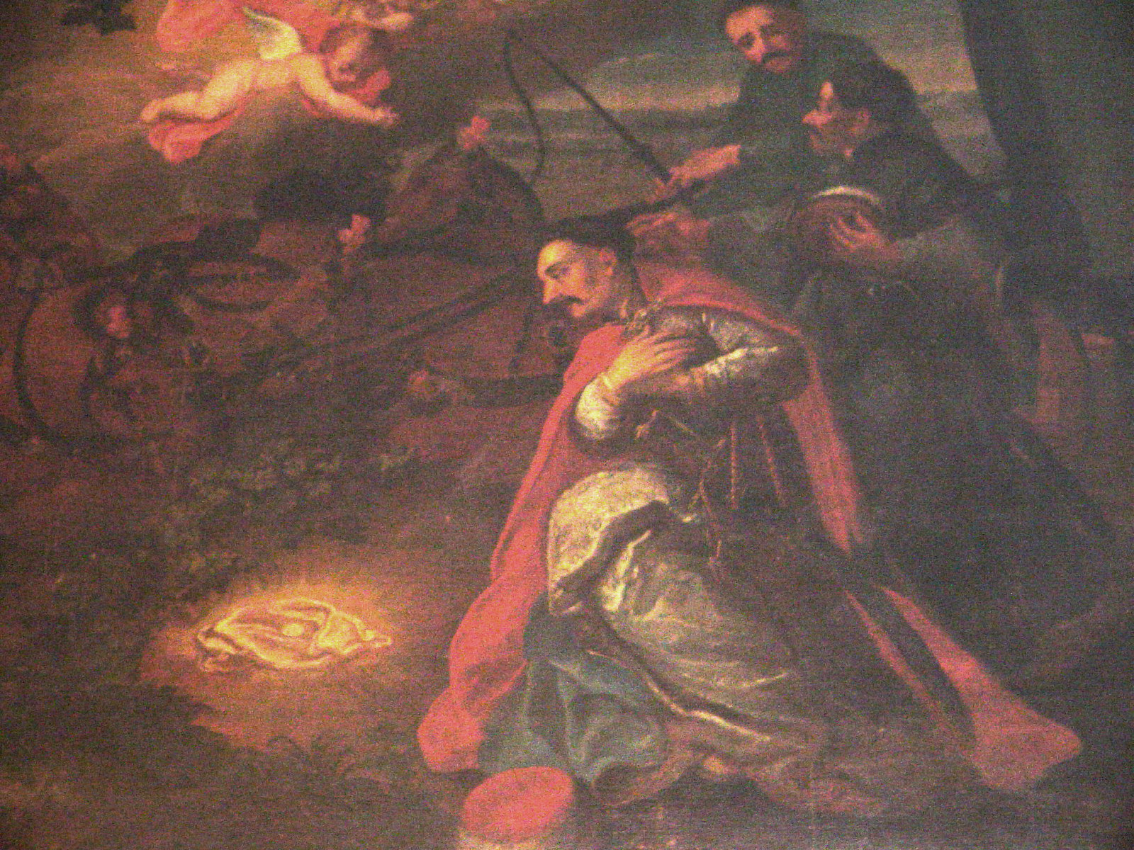 Obraz znalezienia Najświętszego Sakramentu w Kościele Św. Michała Archanioła w Długołęce (województwo dolnośląskie)